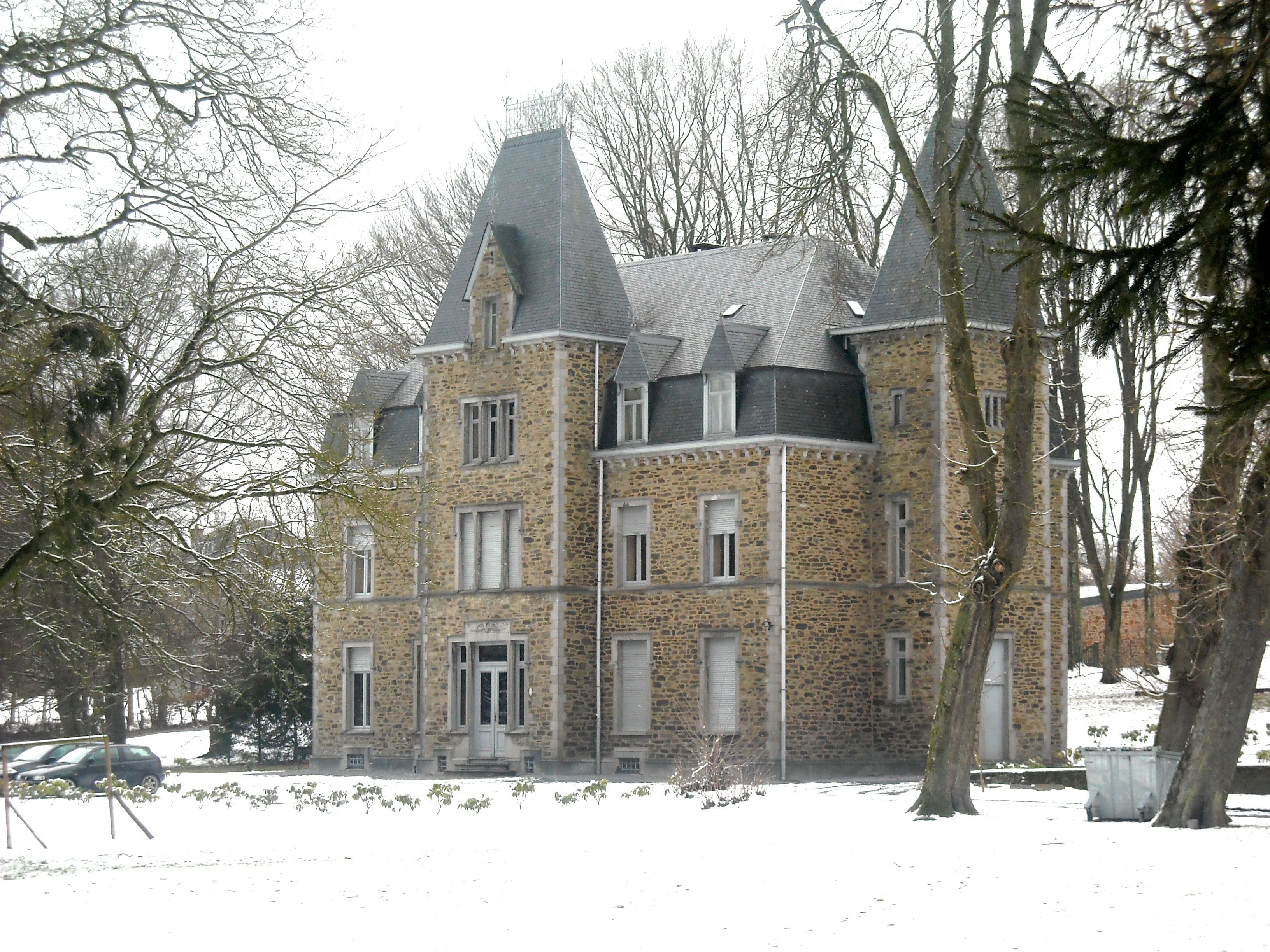 Le chateau de Porcheresse, Porcheresse en Ardenne - Belgique, province de Luxembourg